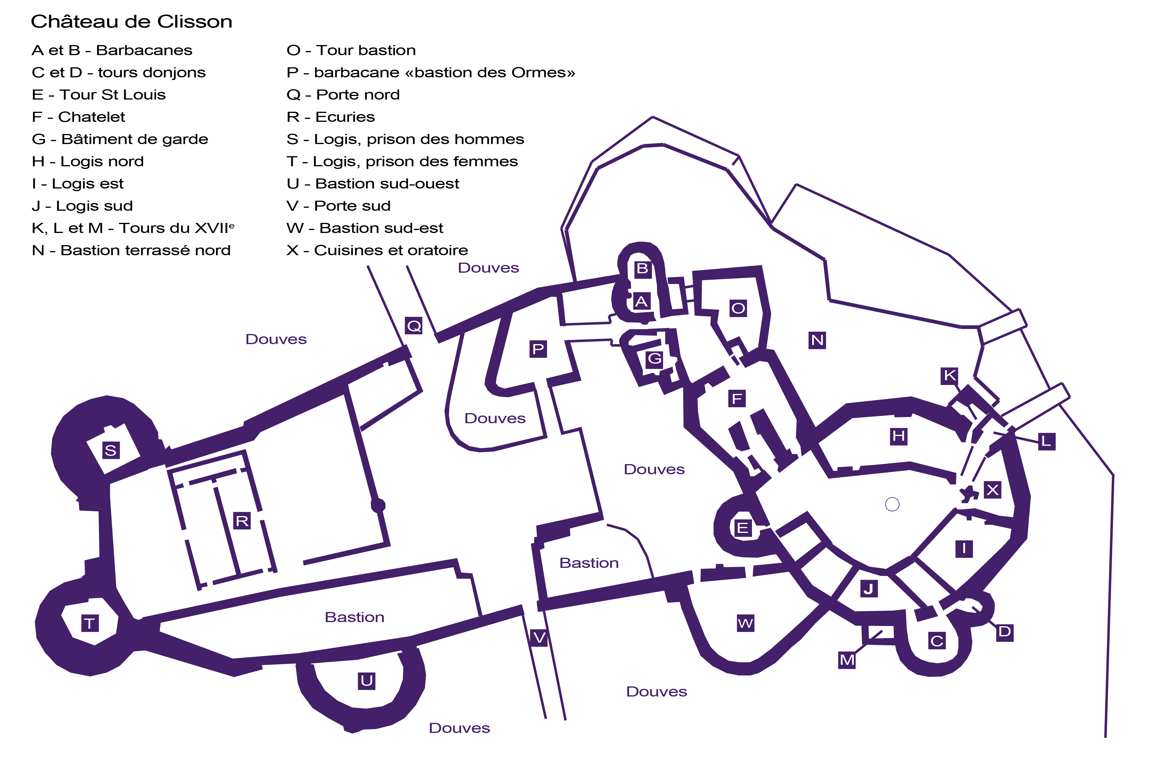 Plan du château de Clisson vers le 17eme siècle